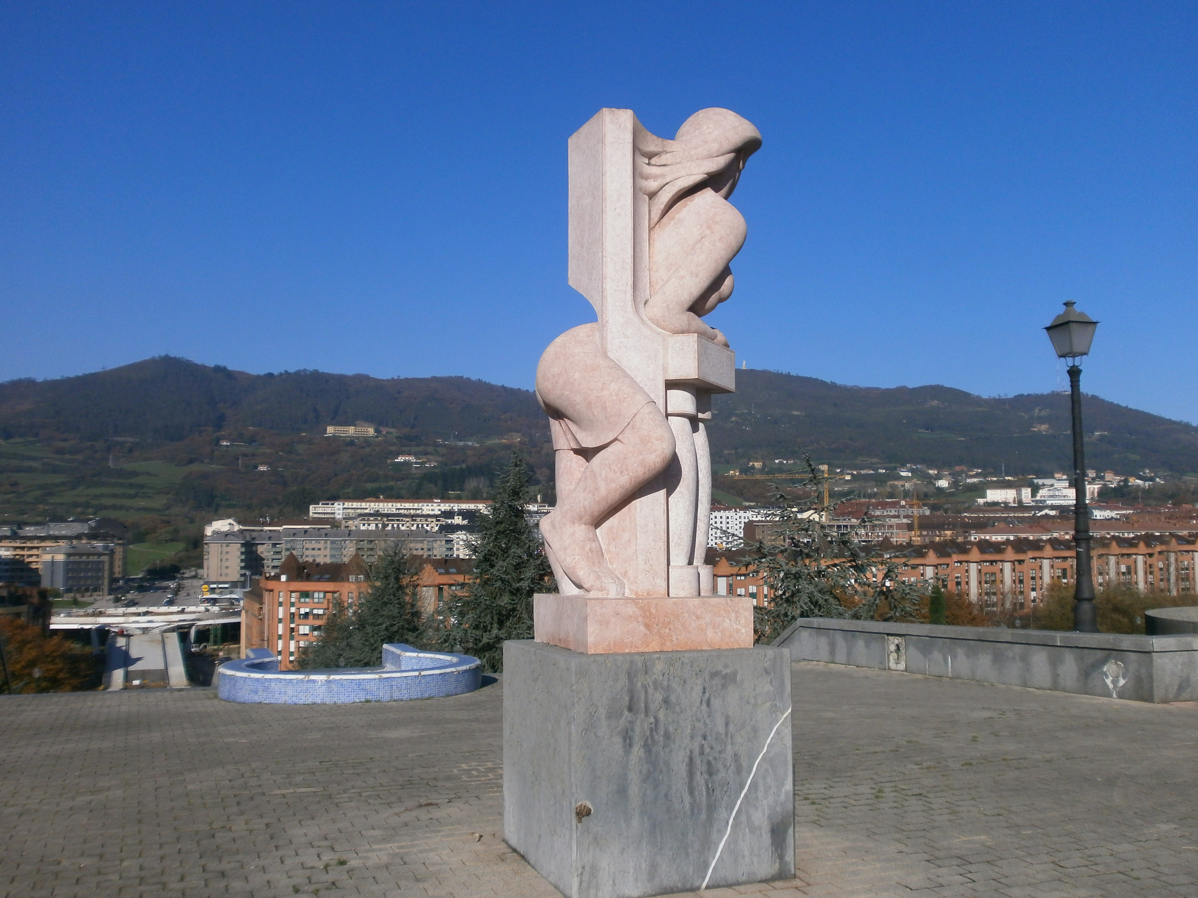 Escultura al aire libre en Oviedo-Dama en el balcón. Parque del Oeste